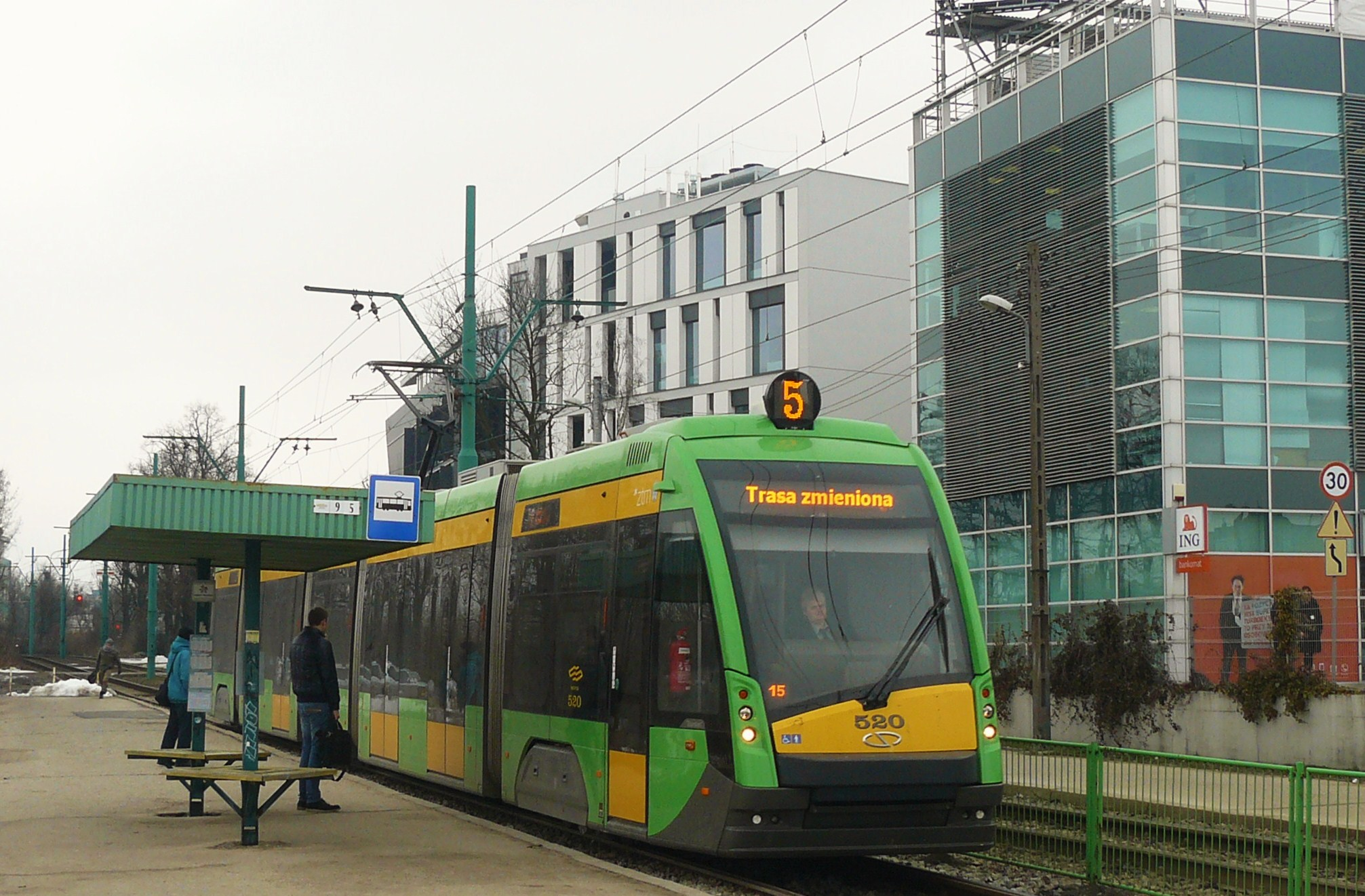 Poznań, przyst. Wrzoska.